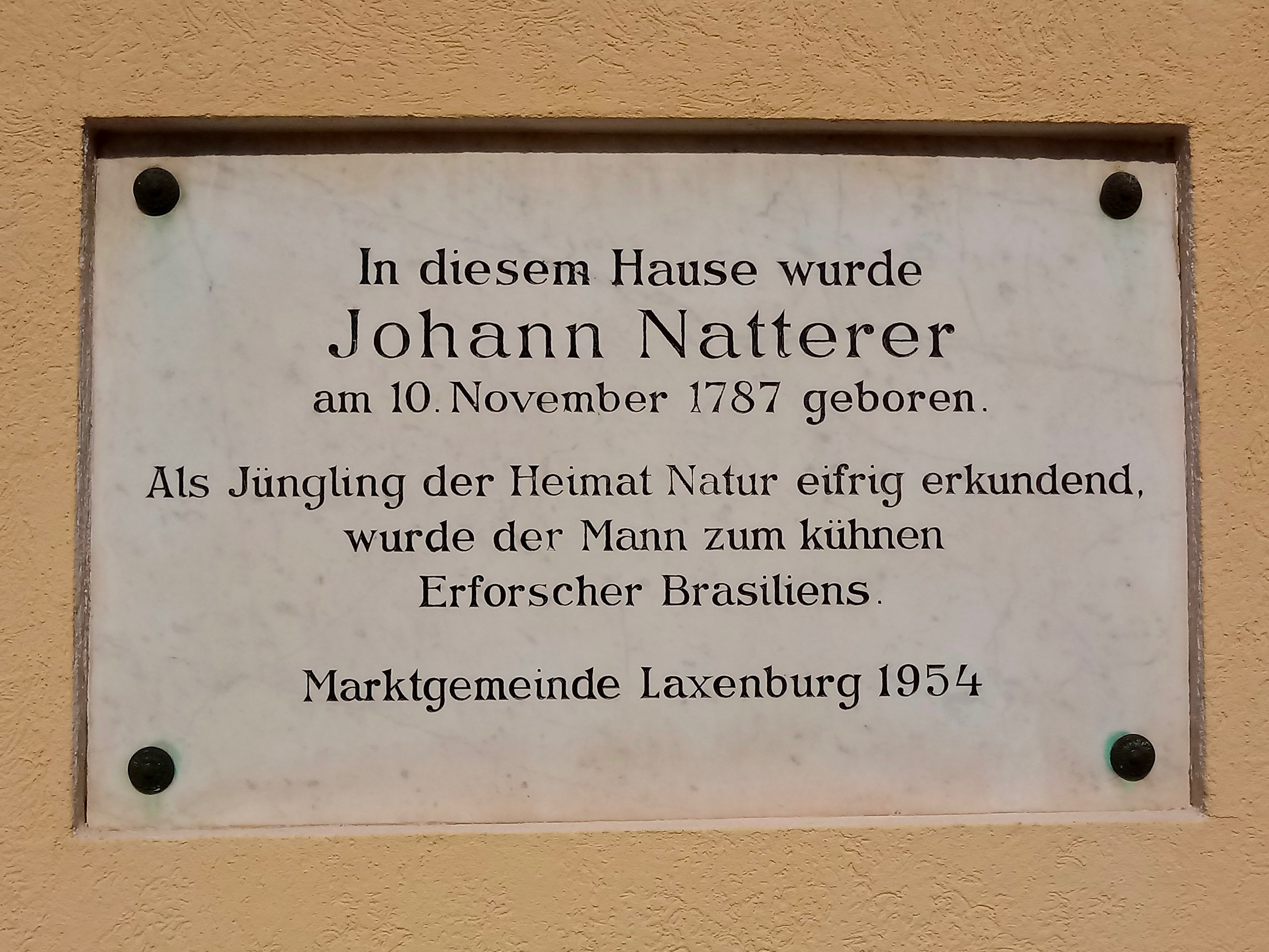 Gedenktafel am Geburtshaus von Johann Natterer. Falkeniergasse 10, Laxenburg.